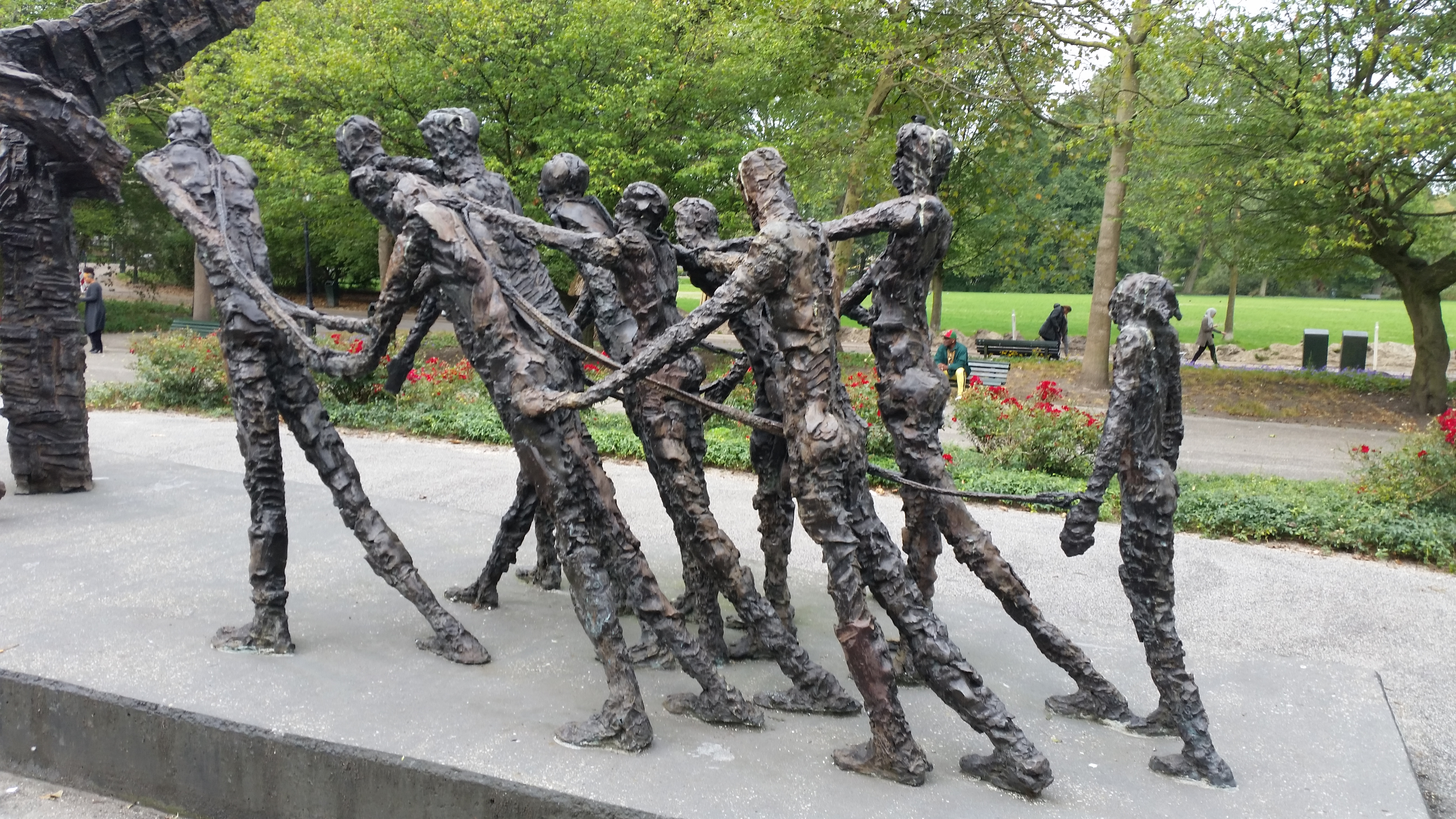 Slavernijmonument (Amsterdam) in 2018